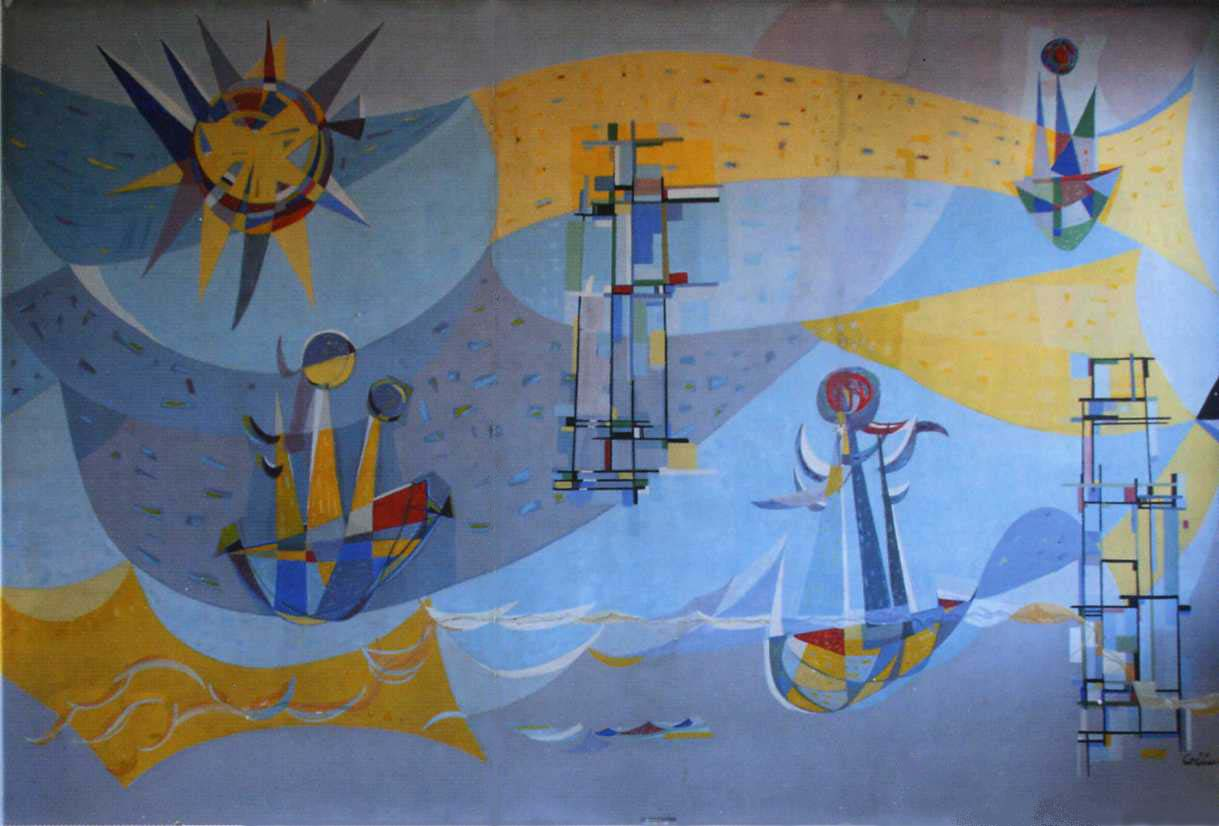 Gedeelte van muurfresco (12x7 meter)vervaardigd door Jan Cobbaert in de inkomhal van het stedelijk zwembad, Hogeschoolplein te Leuven. (vernietigd medio 2005).